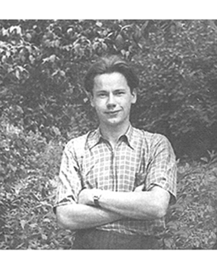 Po wojnie rodzina Jana Sucha osiedliła się na Ziemiach Zachodnich w Szonowie, woj. opolskie. W pobliskim miasteczku, Głogówku, ukończył w 1950 r. Liceum Pedagogiczne. Zdjęcie przed maturą.